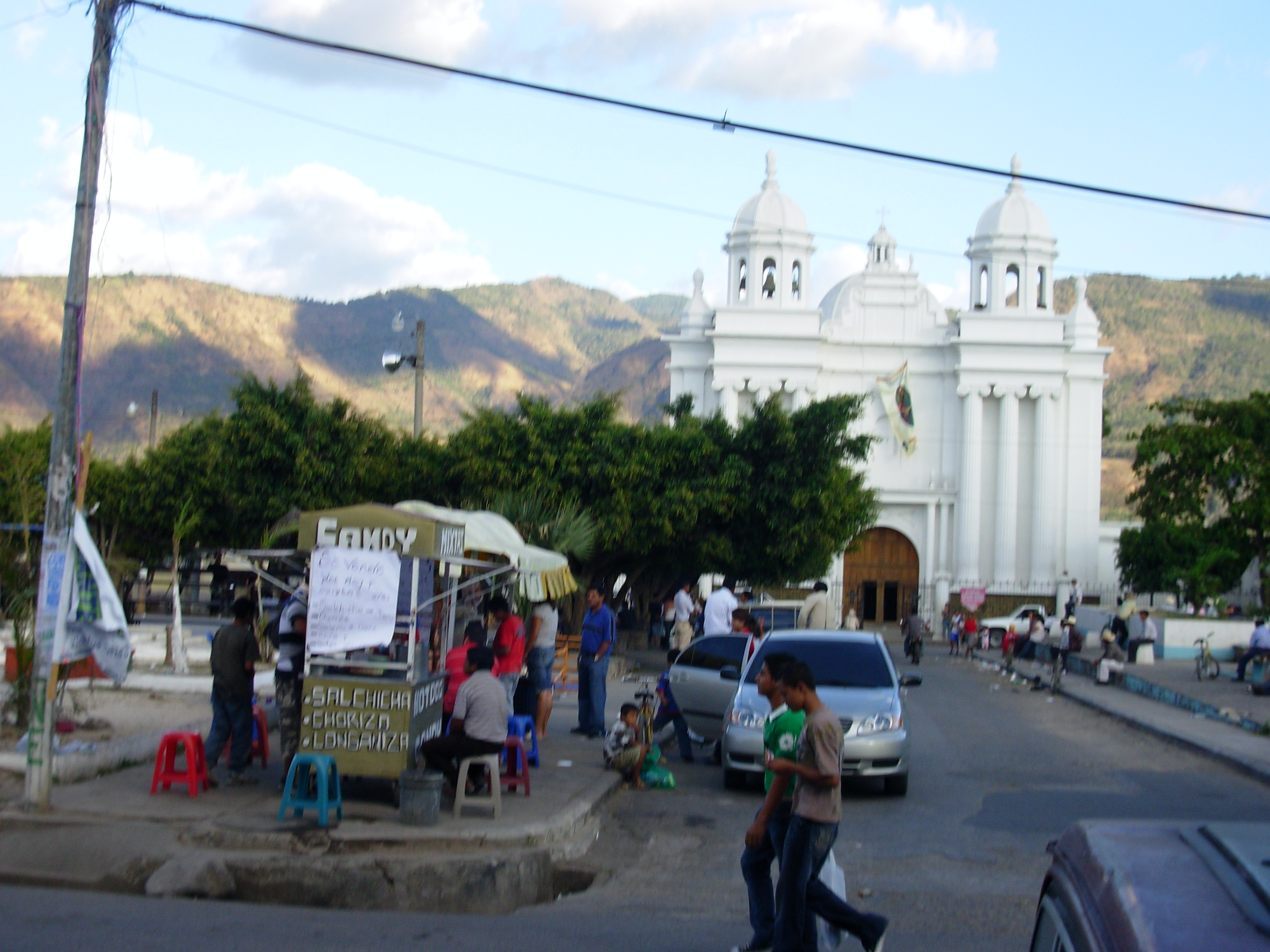 Templo catolico principal de Nueva Santa Rosa.